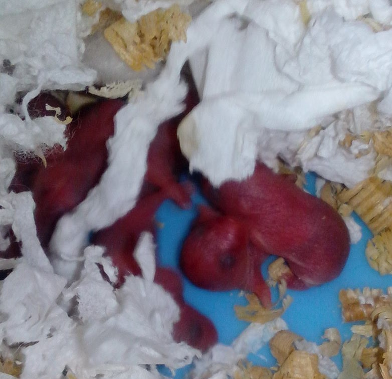 Phodopus sungorus